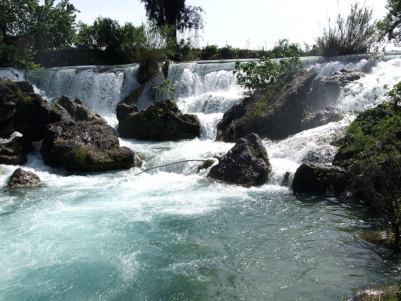 Tarso - Cascate del Fiume Cidno